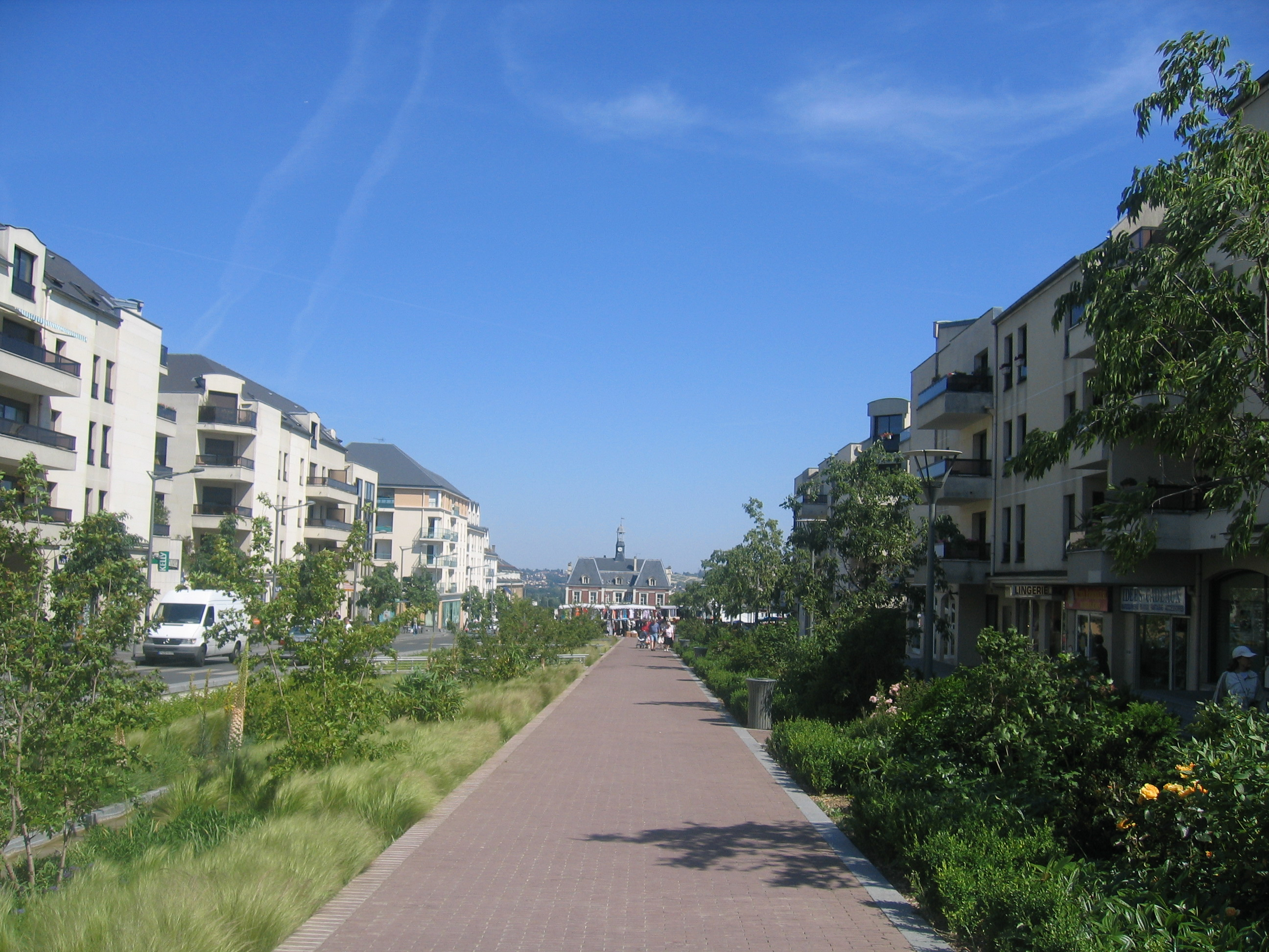 Le nouveau centre ville de Noisy-le-Grand après réfection (France).